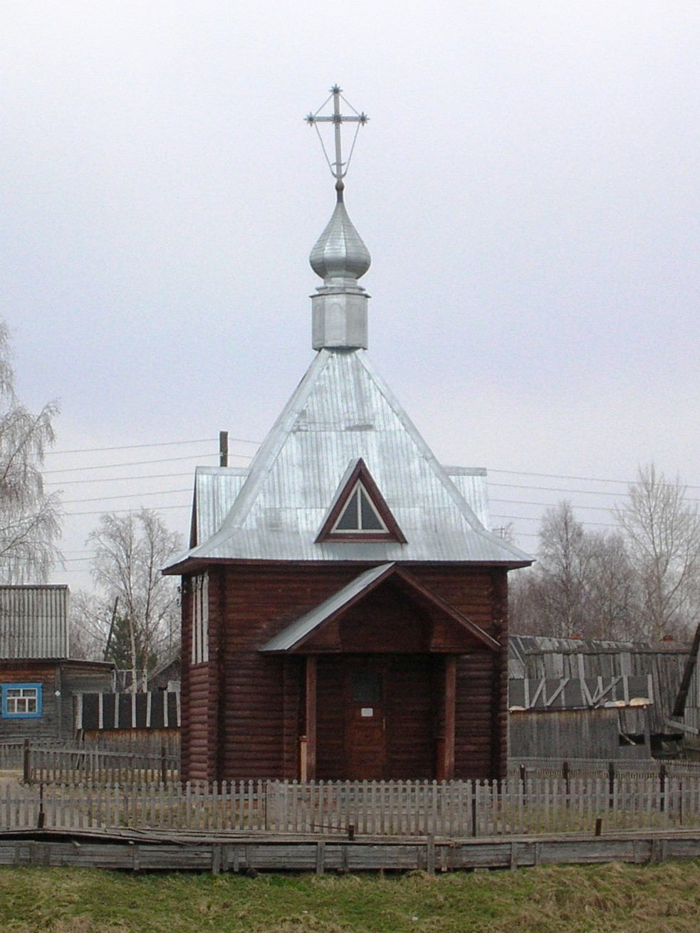 Часовня во имя преподобных Григория и Кассиана Авнежских в посёлке Туровце Вологодской области